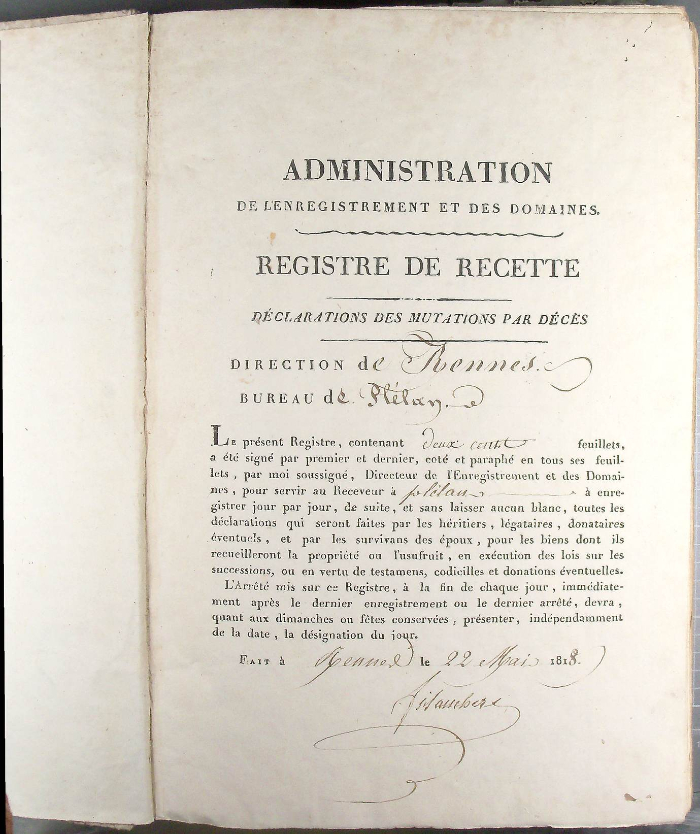 Première page type d'un registre des Archives d'Ille-et-Vilaine, sous-série 3Q, les héritiers du bureau d'enregistrement le plus proche de leur domicile, ici Plélan-le-Grand, s'y présentent et payent une taxe calculée sur la base de la valeur des meubles et des immeubles dont ils viennent d'hériter. XIXe siècle.